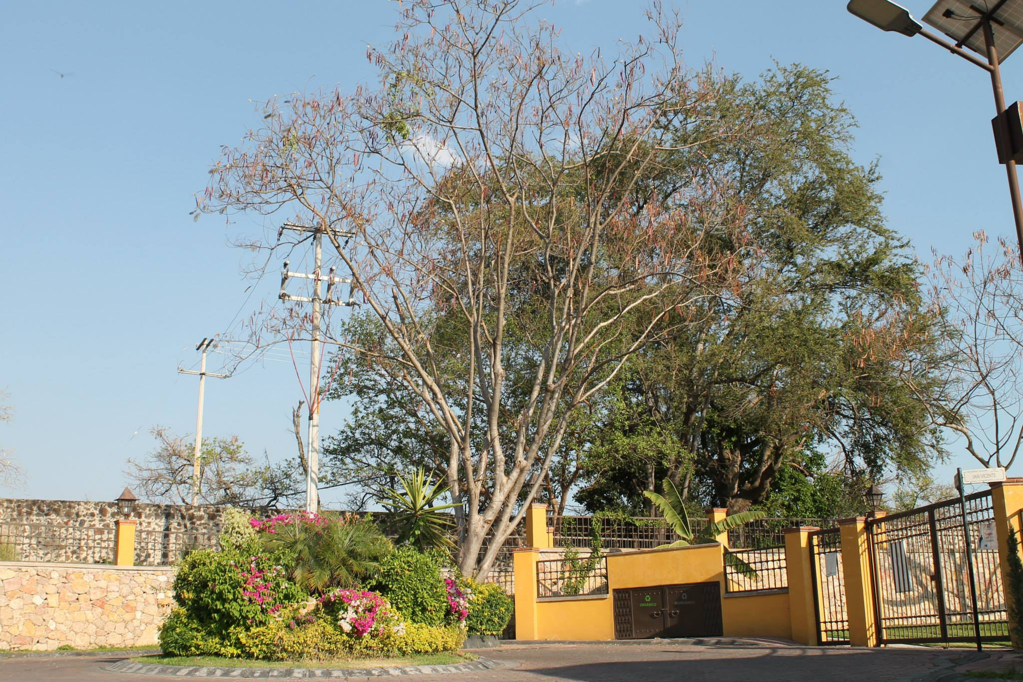 arbol de la glorieta